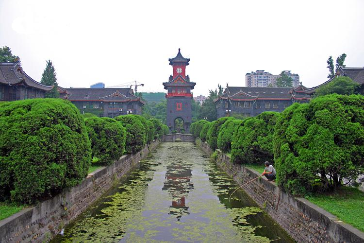 四川大学华西医学院钟楼